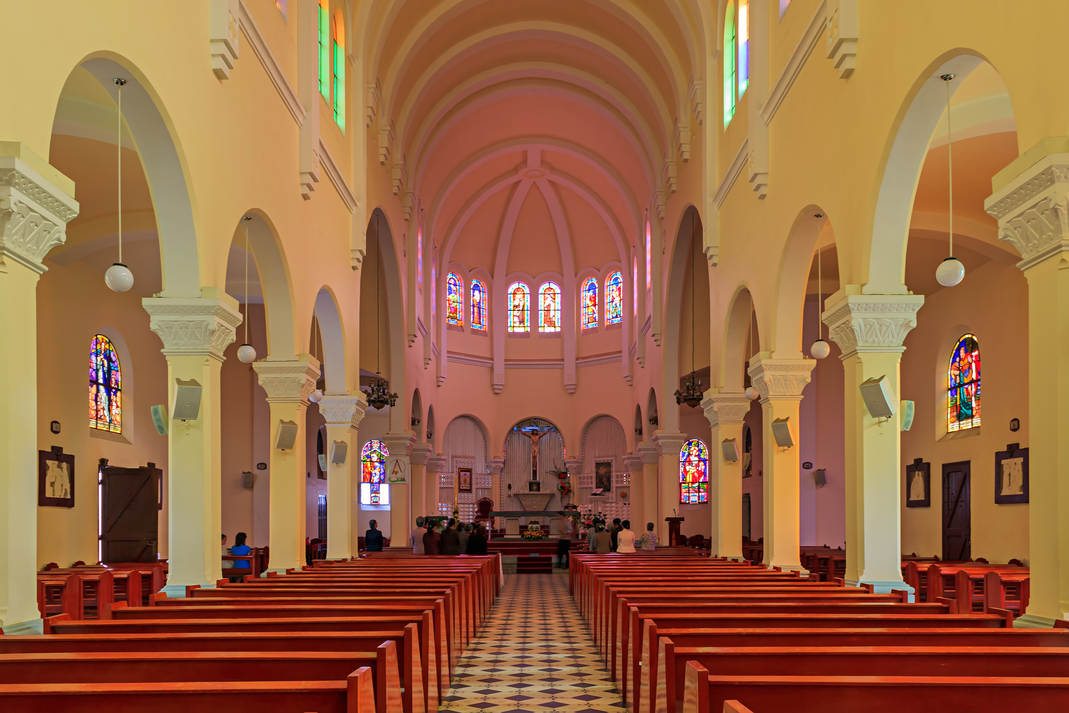 Bên trong nhà thờ Chính tòa Đà Lạt (còn được gọi là nhà thờ Con Gà), Việt Nam.